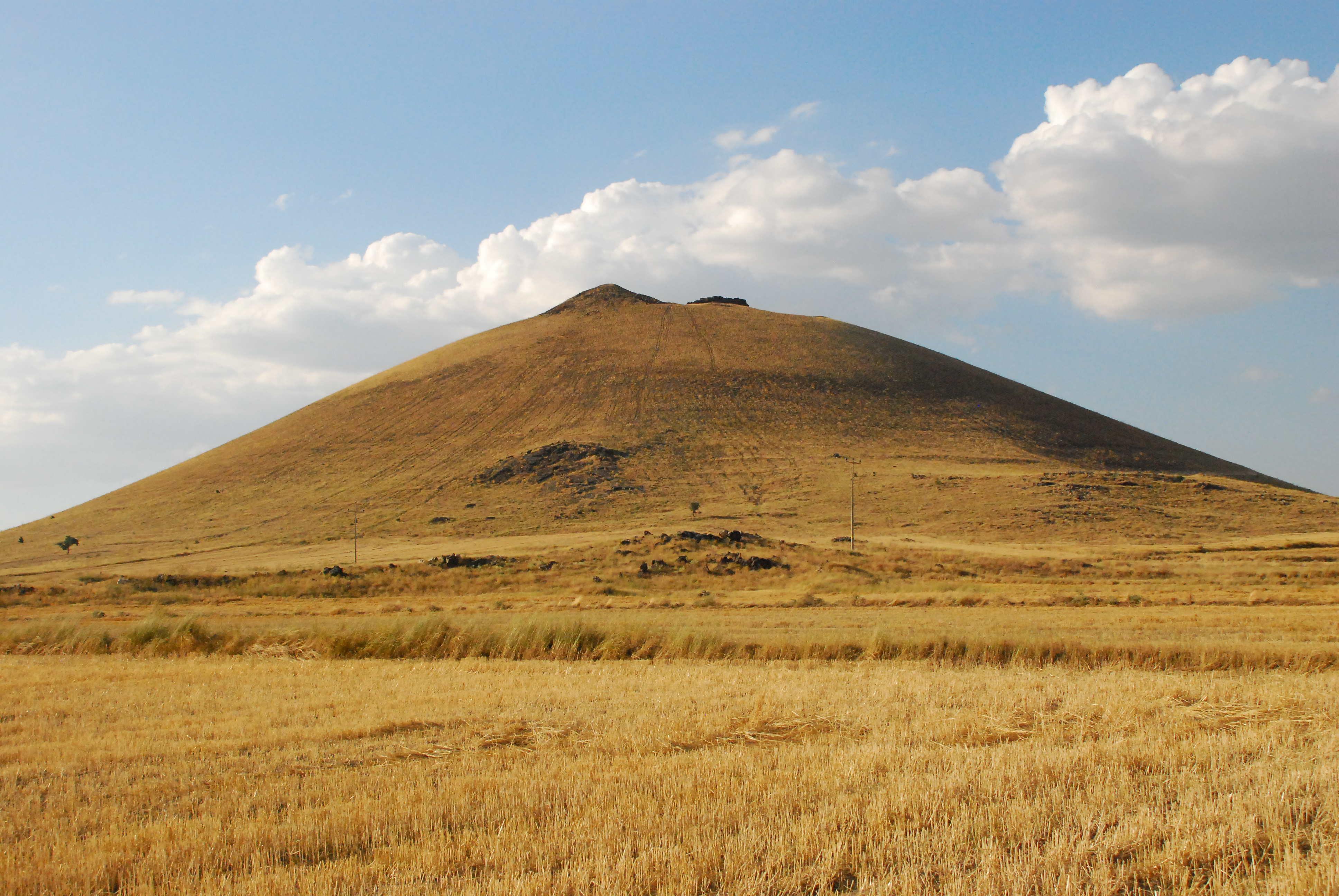 Niğde ilinde bulunan bir Skorya(sinder) Konisi